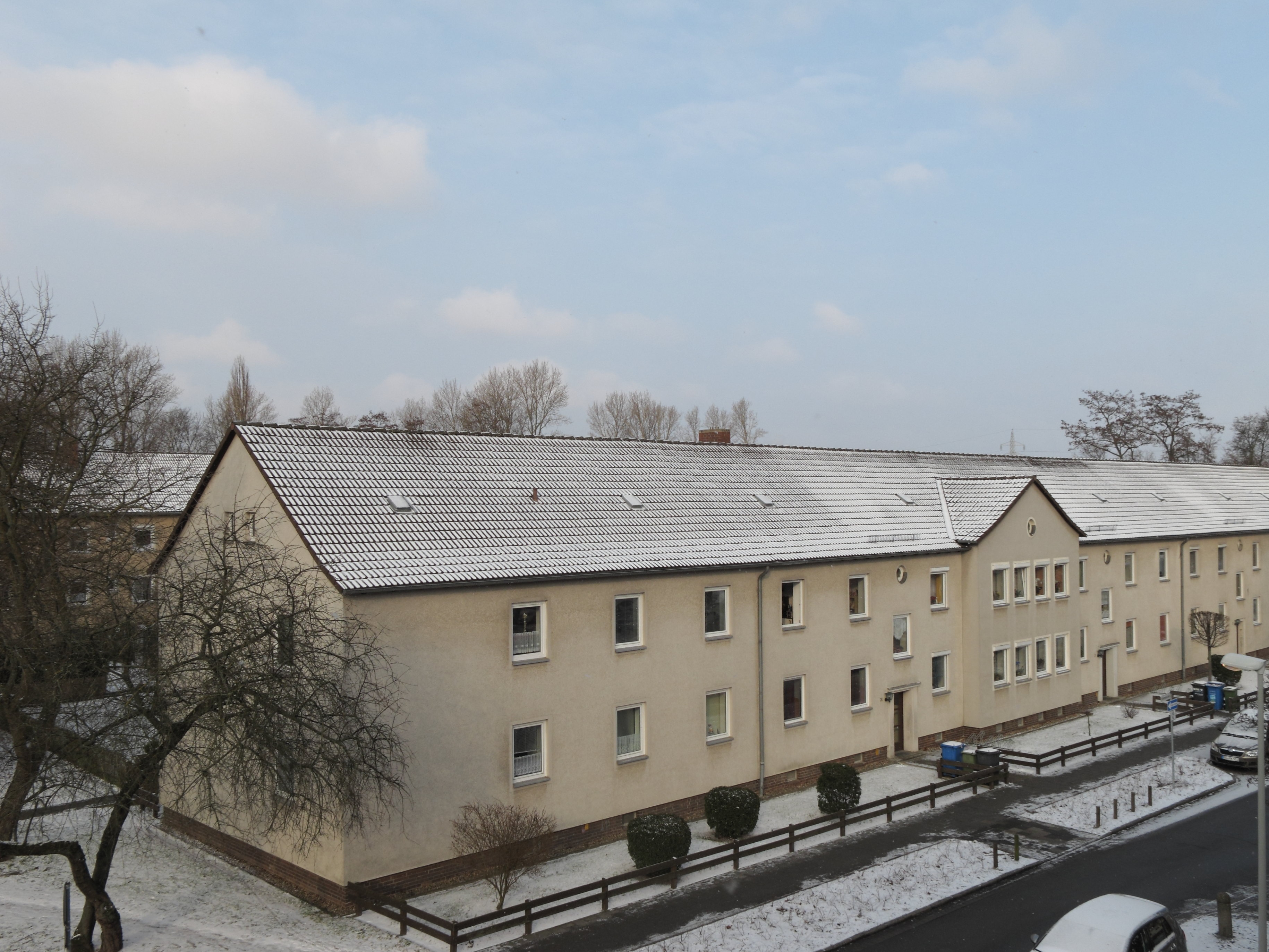 Braunschweig, Vorwerksiedlung, typisches Wohngebäude